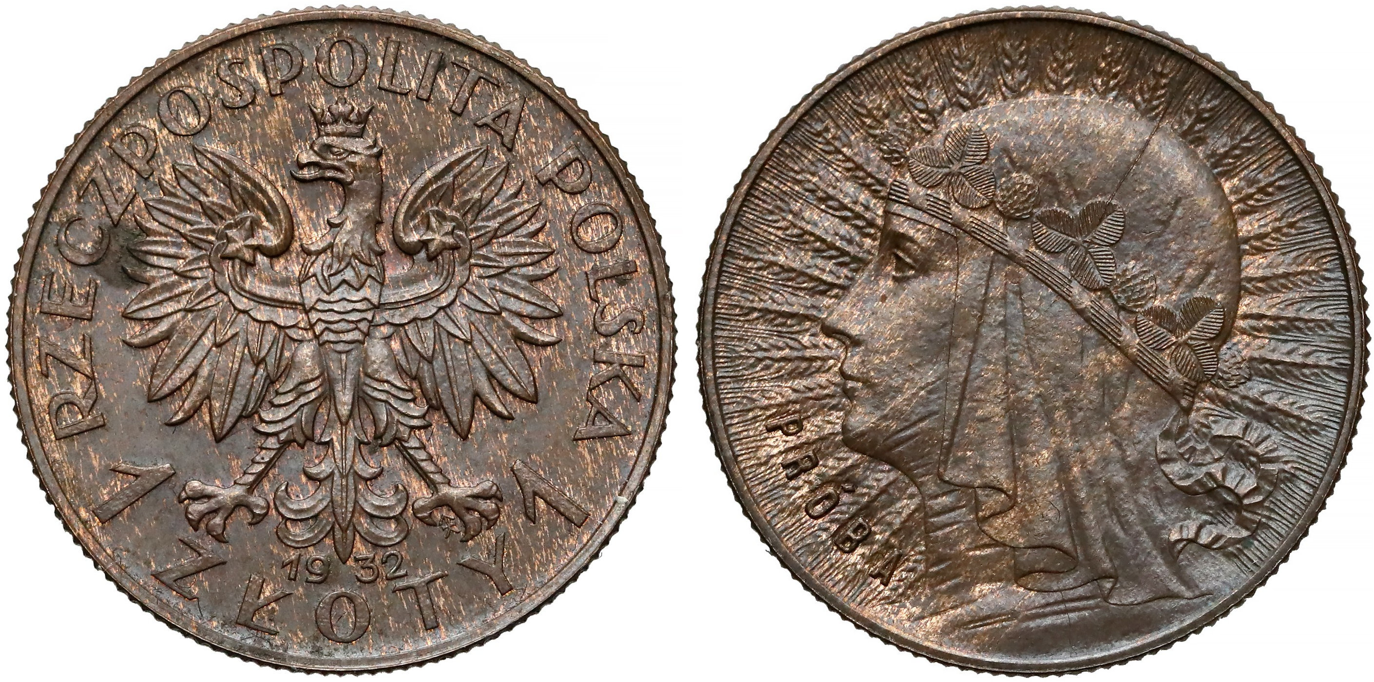 PRÓBA 1 złoty 1932 Polonia brąz